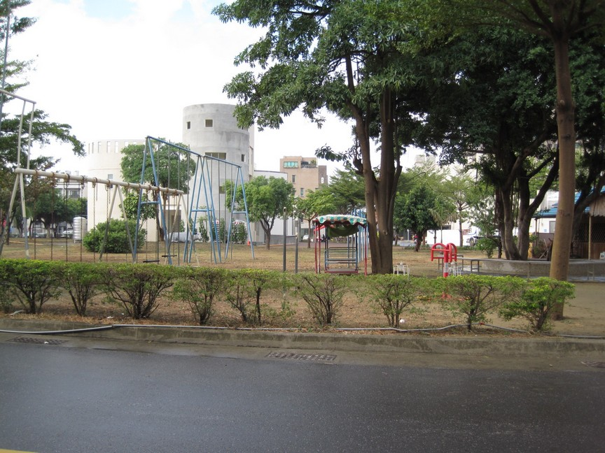 和平里運動公園一景